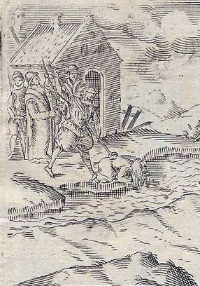 Detail die Hinrichtung der Elsbeth Hügline darstellend, entnommen dem Porträt Balthasar von Christoffel van Sichem, 1606.